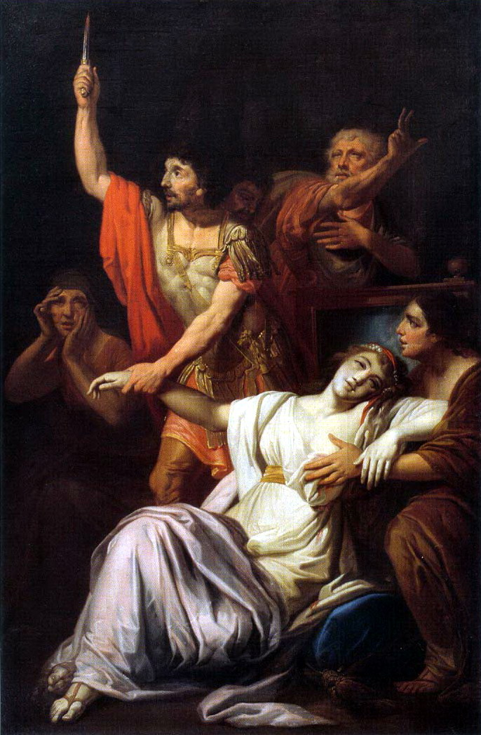 Шебуев Василий Козьмич. Смерть Камиллы, сестры Горация. 1821. Холст, масло Размер 163.5 x 105.5